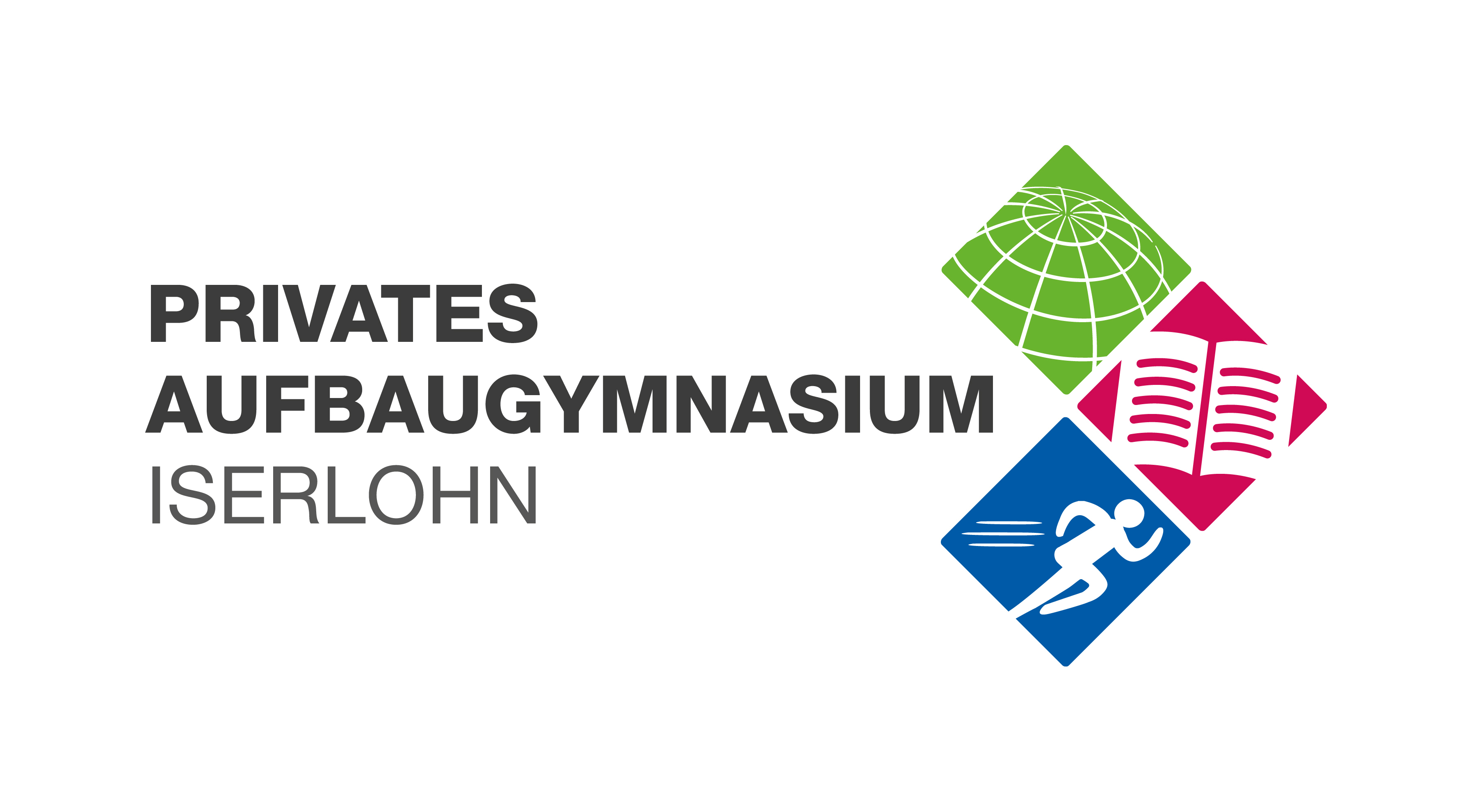 Das Logo des Privaten Aufbaugymnasiums Iserlohn wurde in Zusammenarbeit der Schülerinnen und Schüler, des Kollegiums und des Teams der Schule gemeinsam entwickelt.